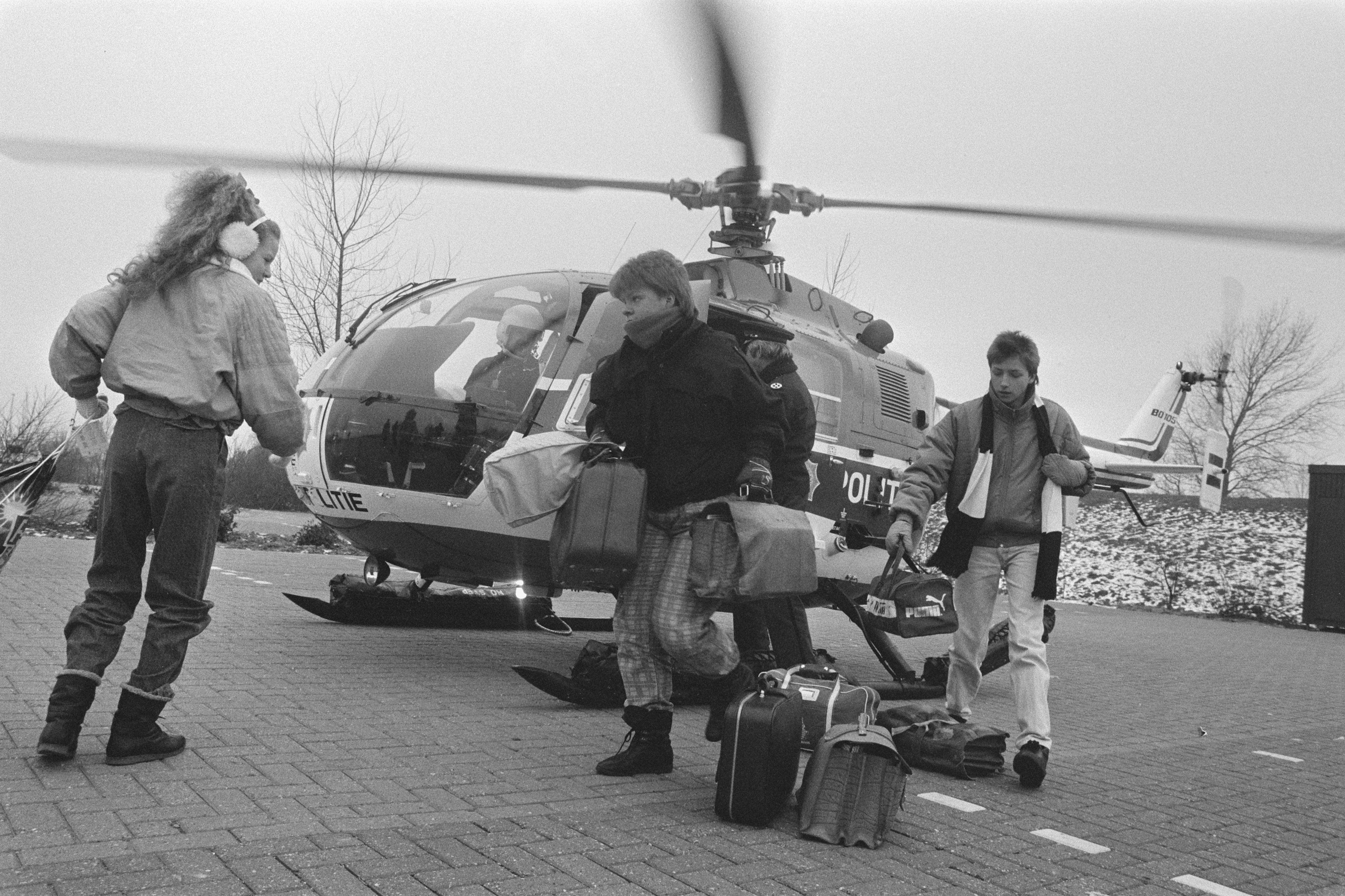 Collectie / Archief : Fotocollectie Anefo Reportage / Serie : [ onbekend ] Beschrijving : Scholieren van eiland Tiengemeten met helicopter naar school in Zuid Beijerland nadat eiland door kou geisoleerd is Datum : 19 januari 1987 Locatie : Zuid-Beijerland, Zuid-Holland Trefwoorden : SCHOLIEREN, helicopters, scholen Fotograaf : Bogaerts, Rob / Anefo Auteursrechthebbende : Nationaal Archief Materiaalsoort : Negatief (zwart/wit) Nummer archiefinventaris : bekijk toegang 2.24.01.05 Bestanddeelnummer : 933-8646